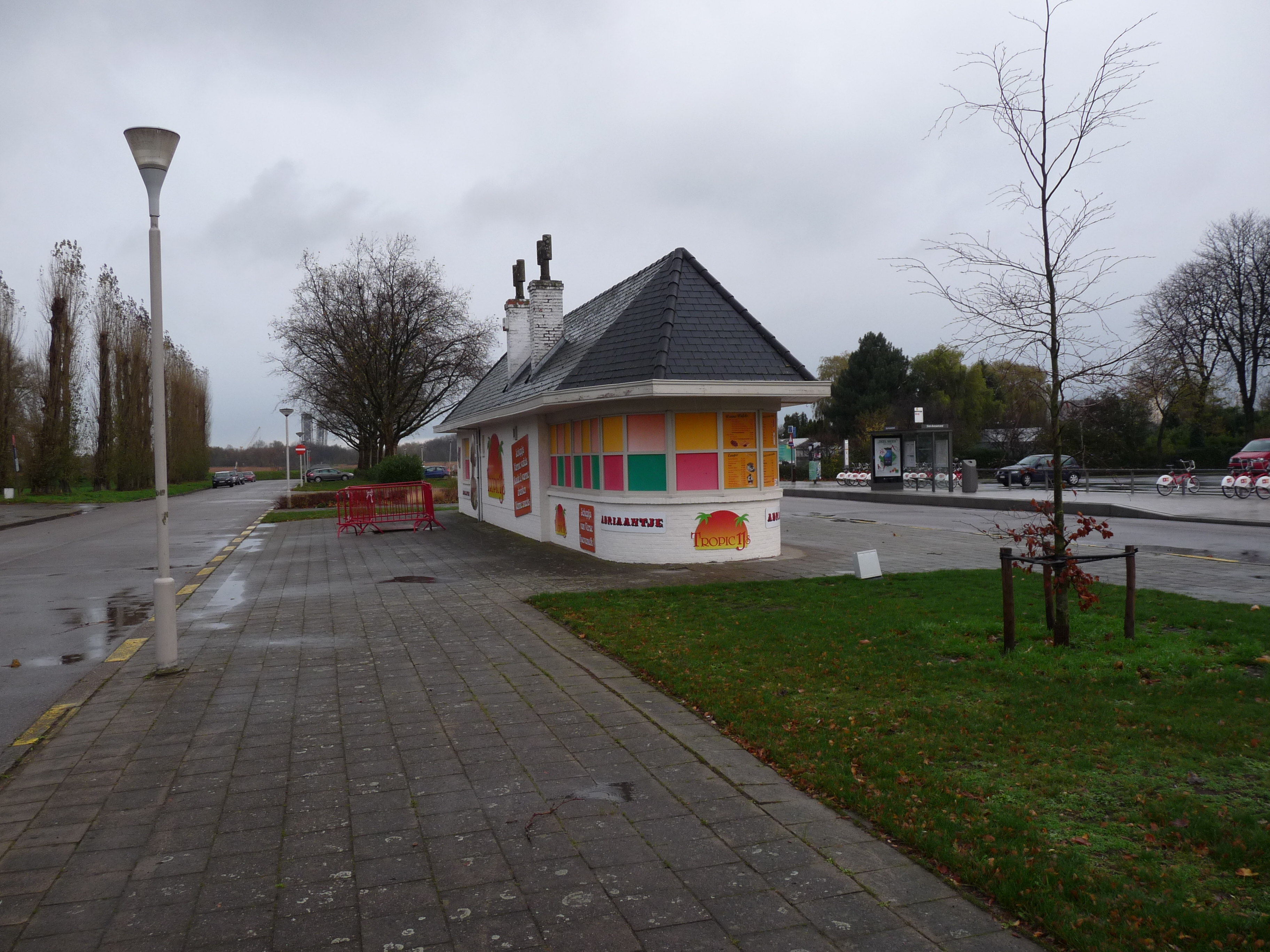 Vroegere tramhalte van de Sint Anneke Express (zie [1]), nu een winkel voor ijsverkoop